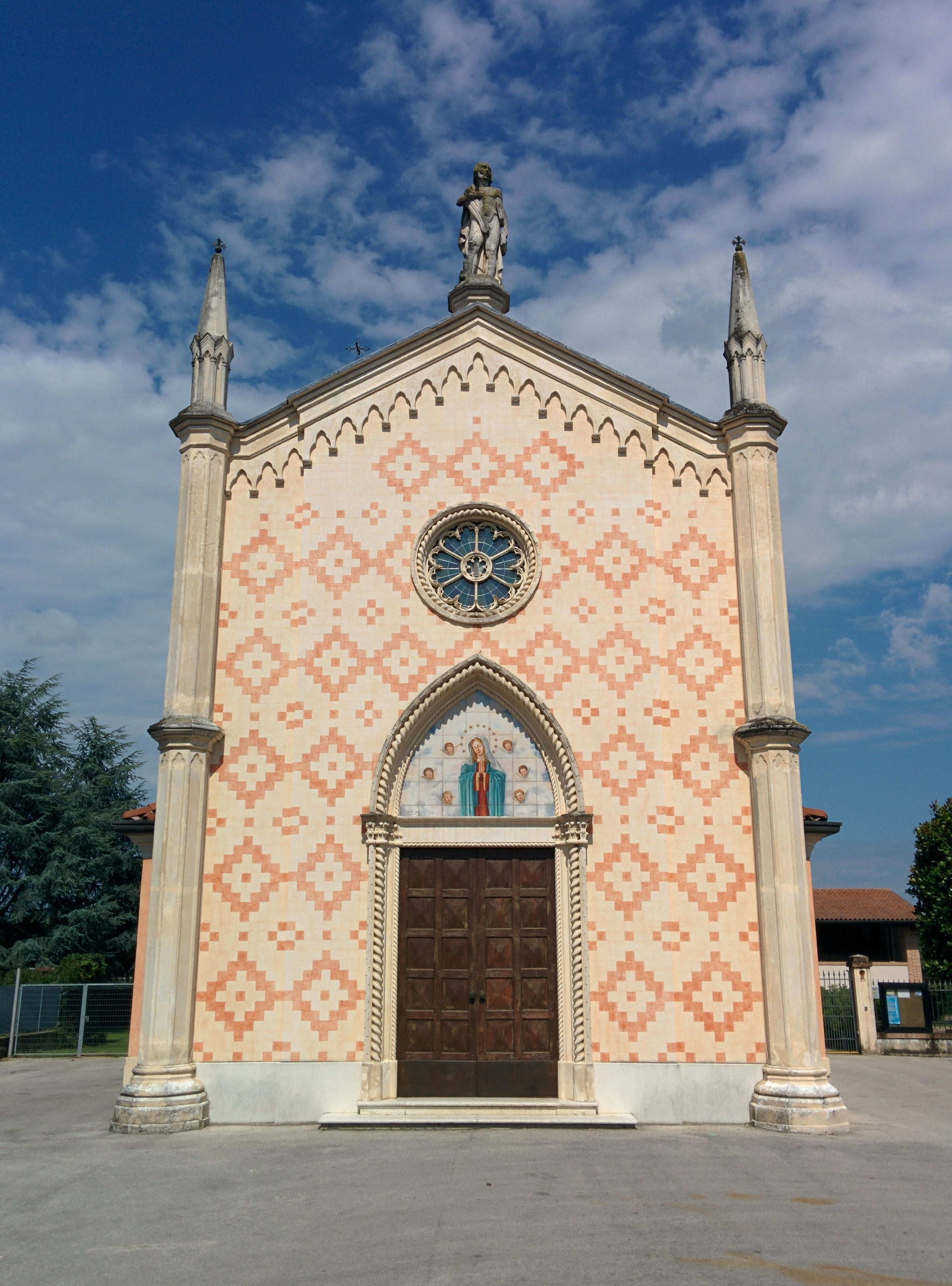 Chiesa parrocchiale di Rettorgole di Caldogno, provincia di Vicenza